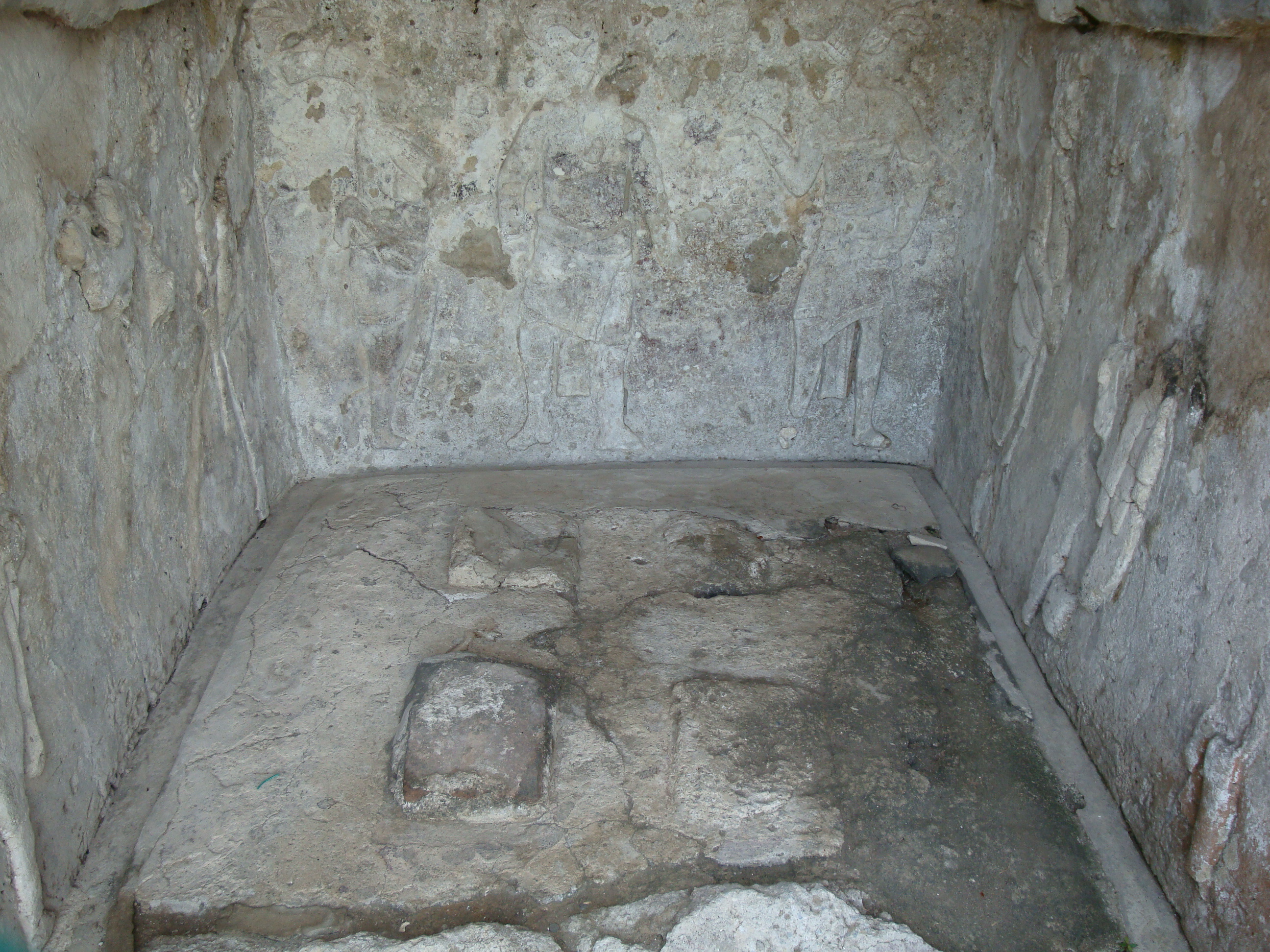 Tumba de los estucos o de los nueve señores de la noche, localizada en la "Gran Acrópolis" entre los Templos V y XI, de la ciudad maya de Comalcalco, Tabasco, México.